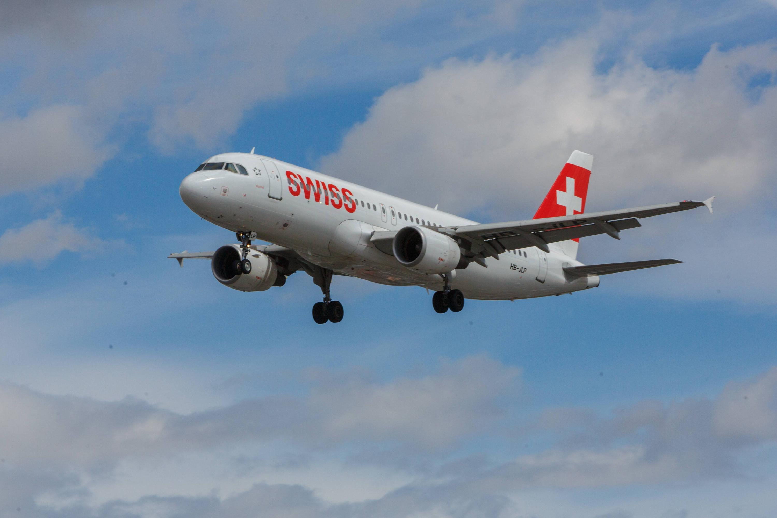 Un Airbus 320 di Swiss